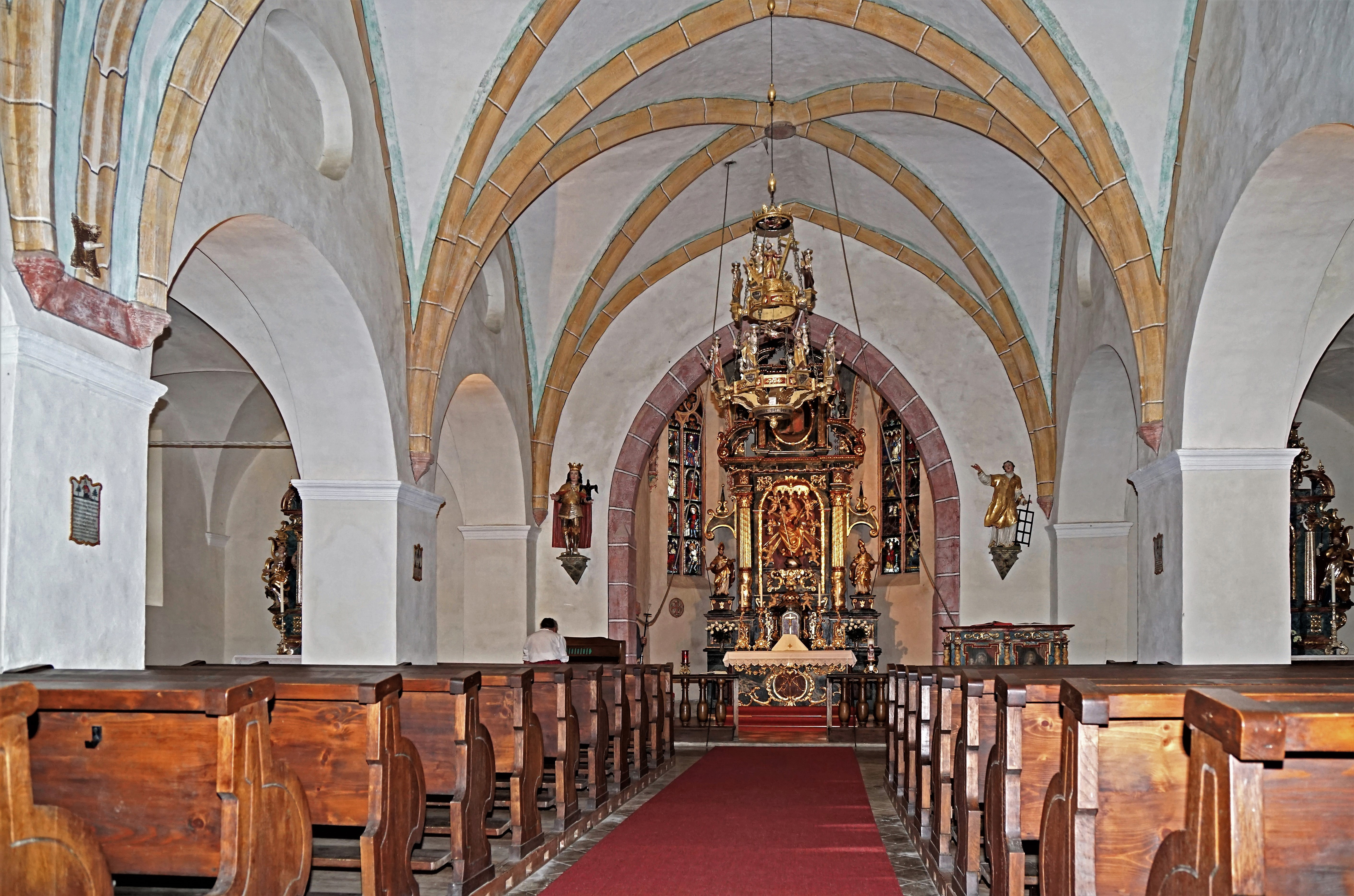 Kath. Filialkirche, Wallfahrtskirche Maria Höfl (Metnitz). Innenansicht